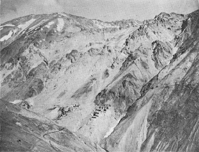 Fotografía exterior del depósito minero, en el centro abajo, se ven dos poblaciones abandonadas